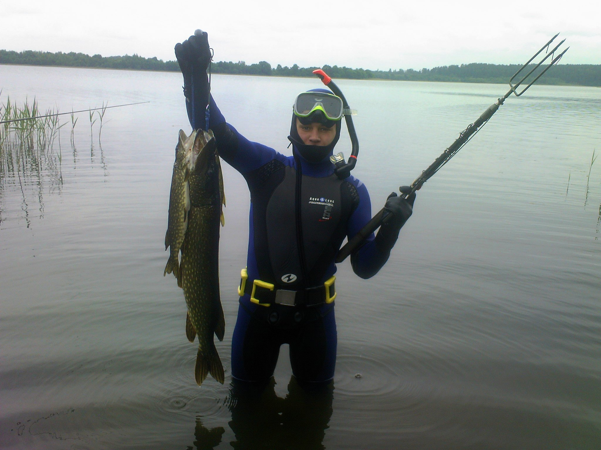 Щучка